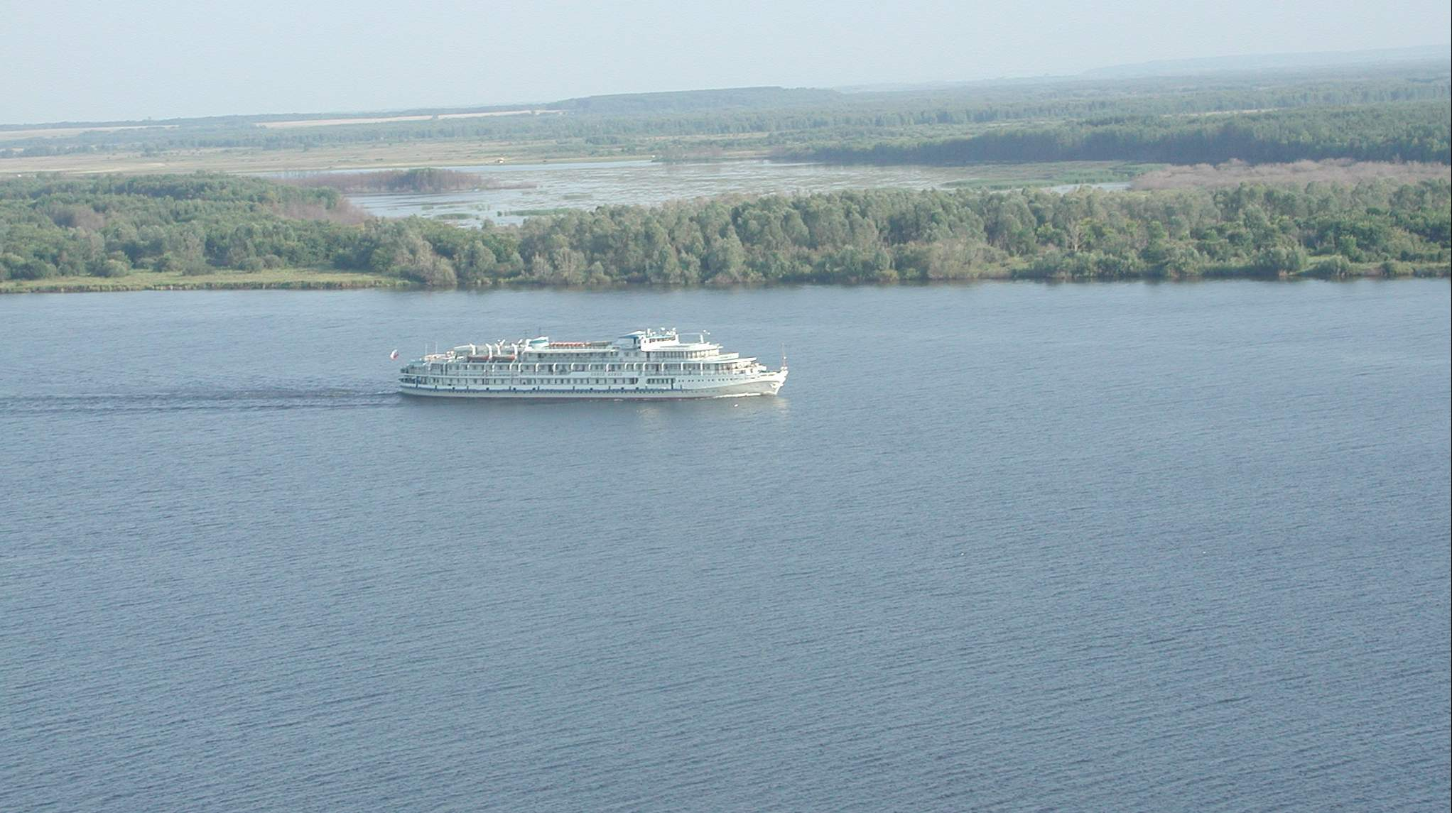 Каракулино. Вид р.Камы с горы